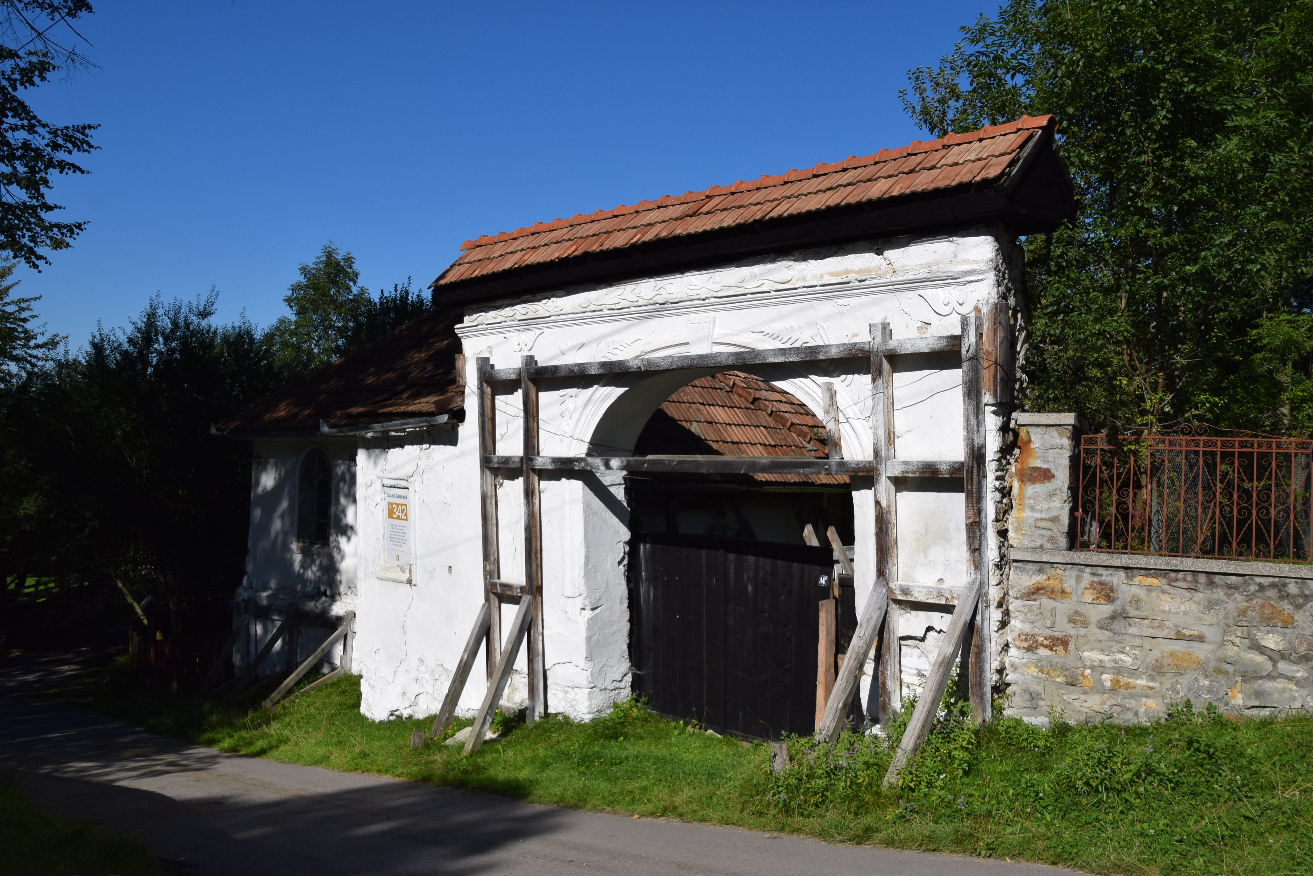 Casă, nr. 342 din Roșia Montană